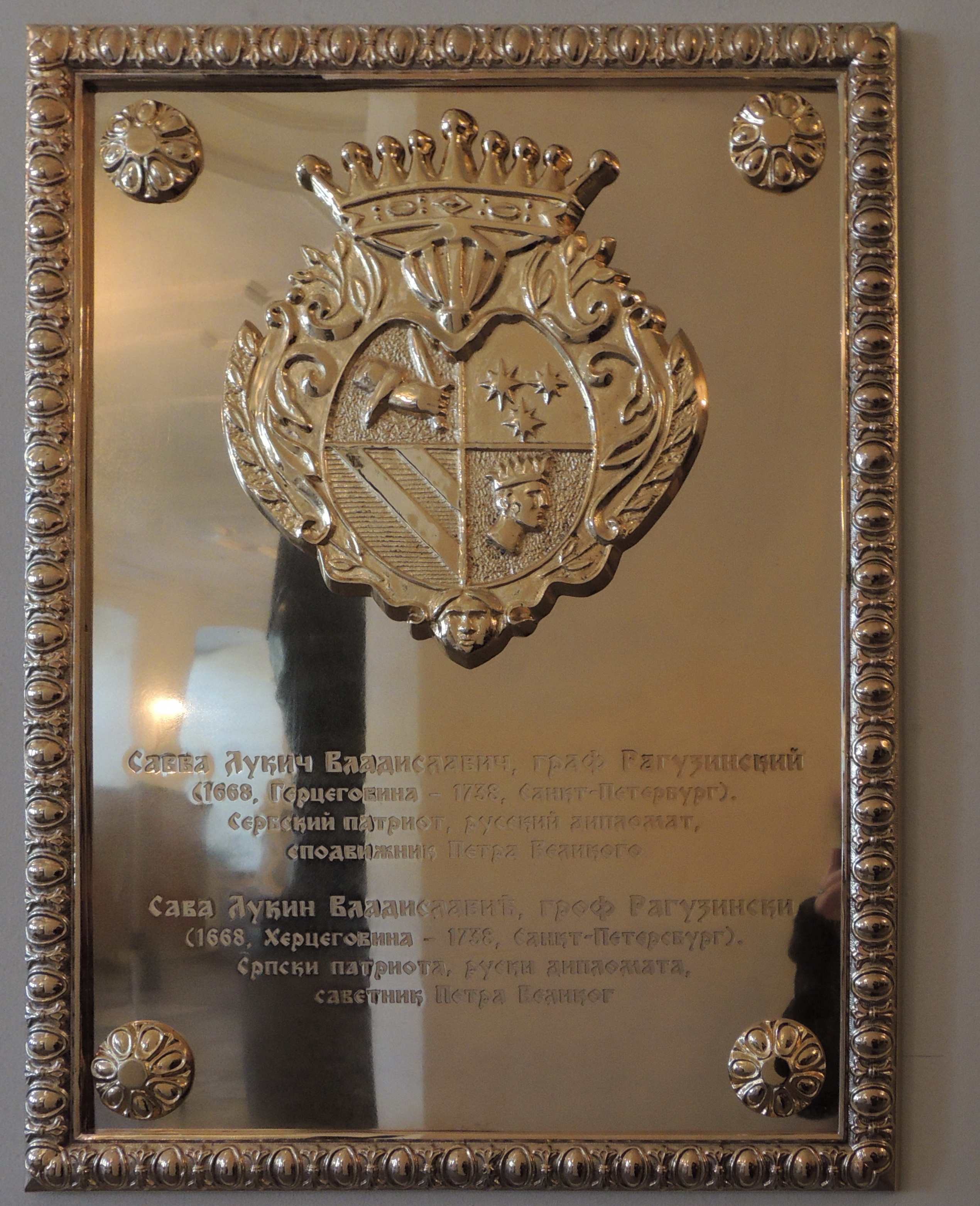 Благовещенская церковь Александро-Невской лавры. Рагузинский-Владиславич, Савва Лукич (Ок. 1670—1738)